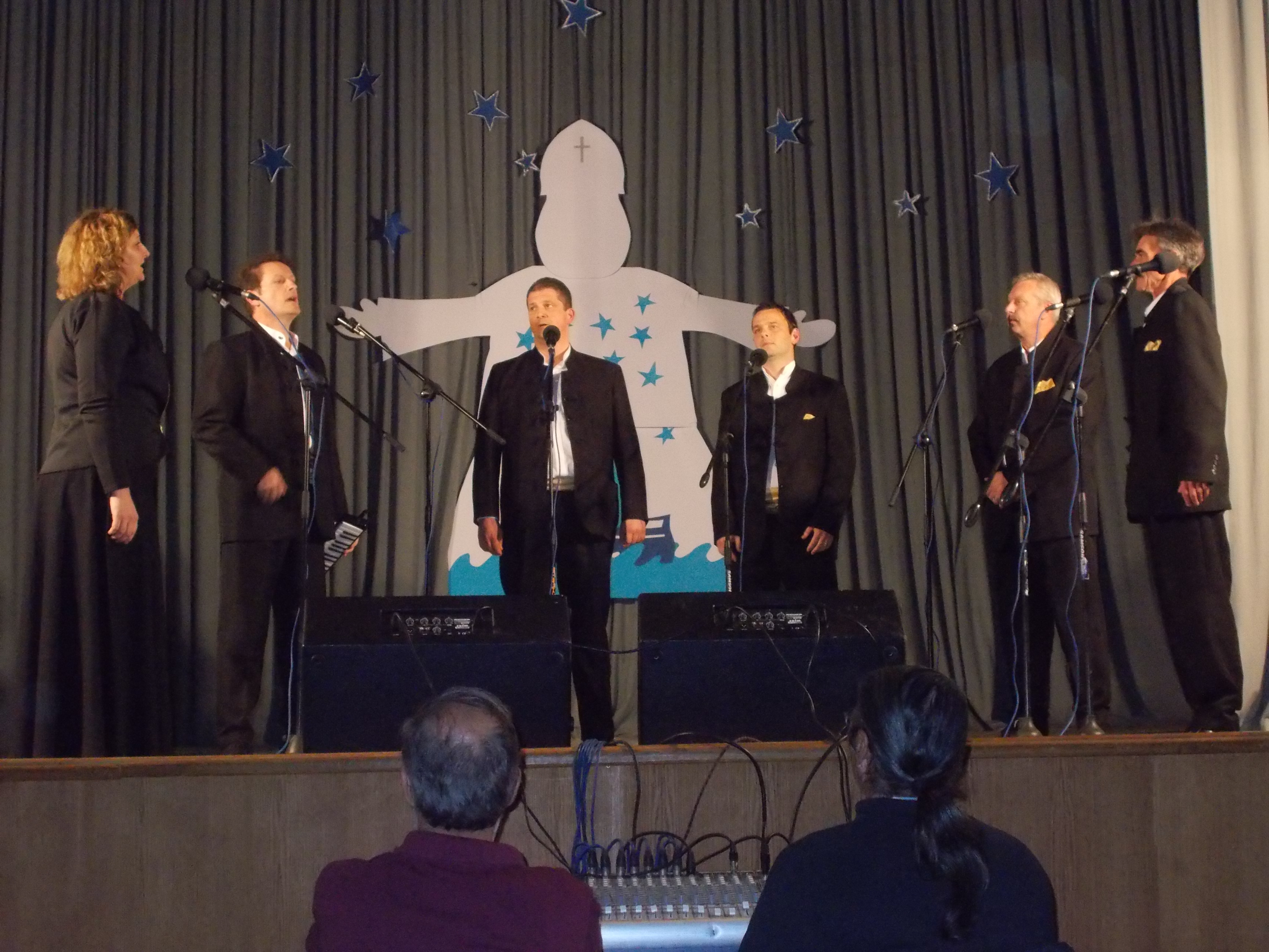 Klapa "Komiža" , 5.12.2016.